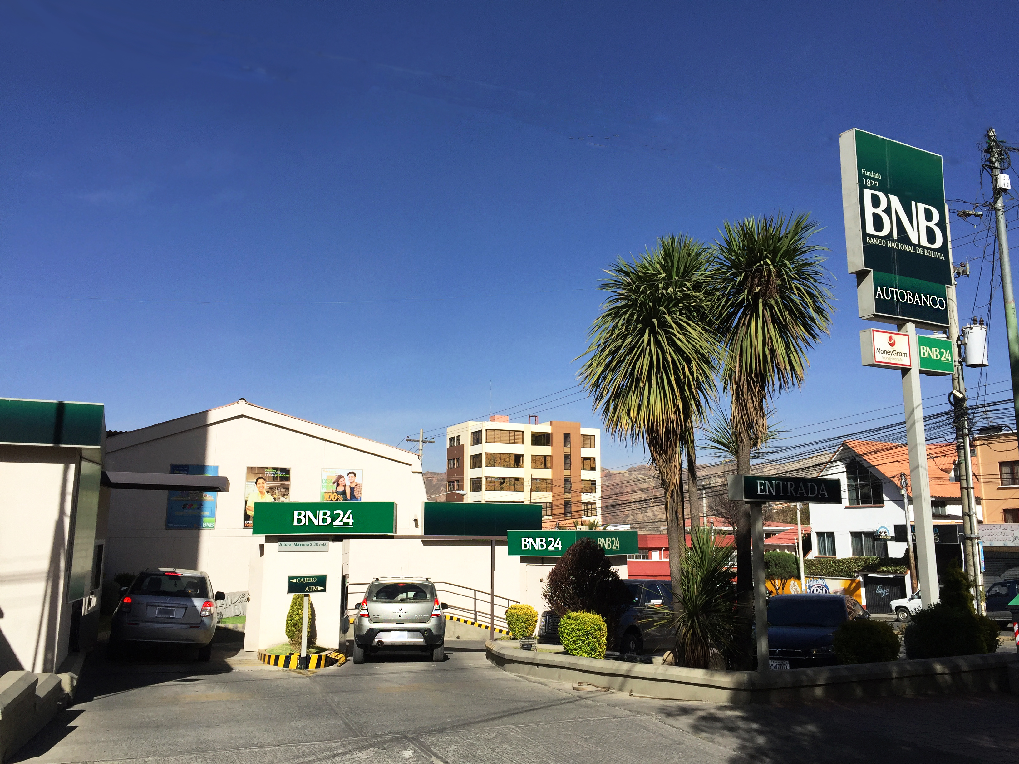 Sucursal del Banco Nacional de Bolivia en la zona de Achumani en La Paz.